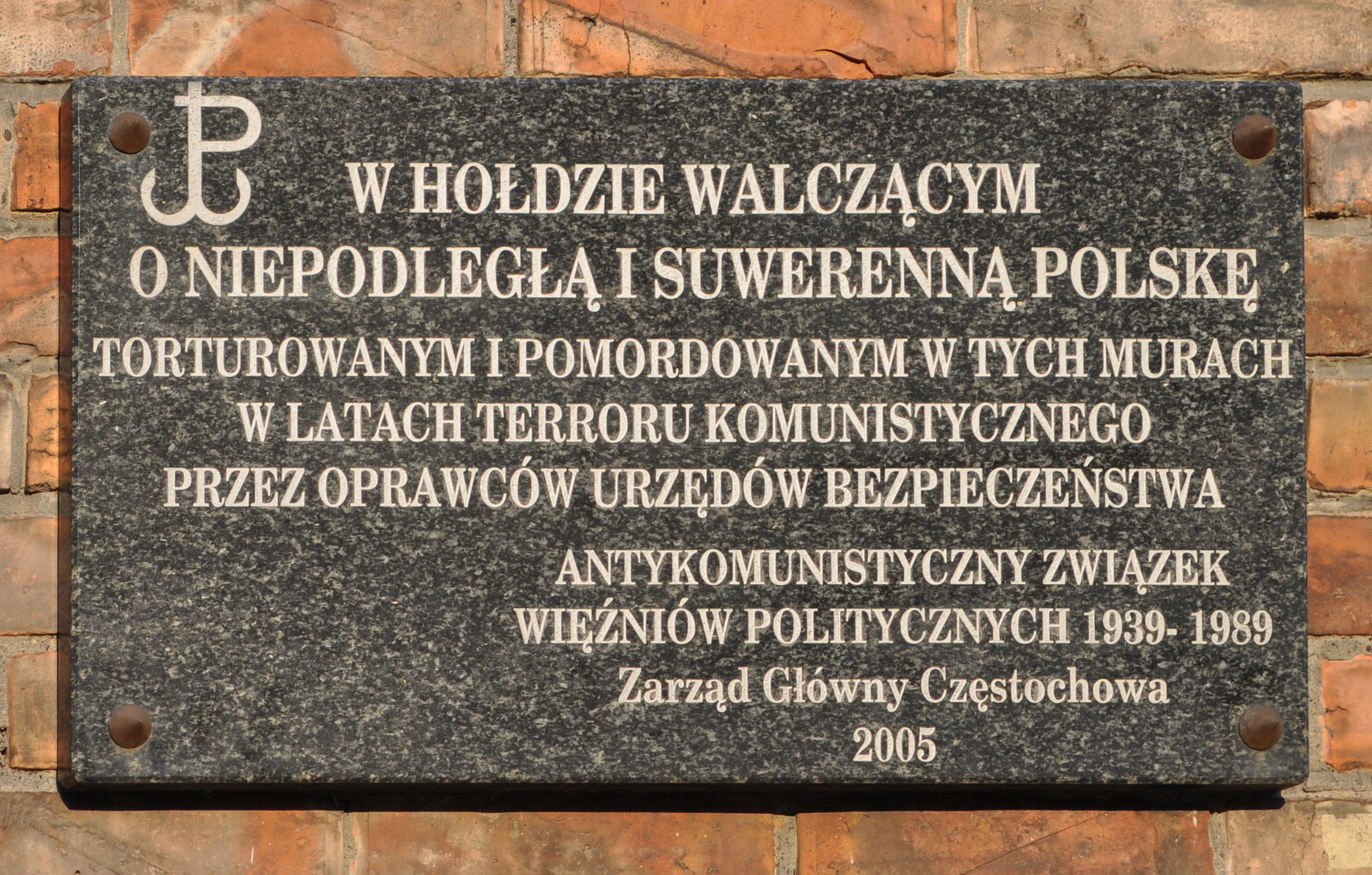 Ten obiekt znajduje się w Ewidencji Miejsc Pamięci Województwa Śląskiego dla miejscowości Częstochowa pod numerem 101/37.Opis